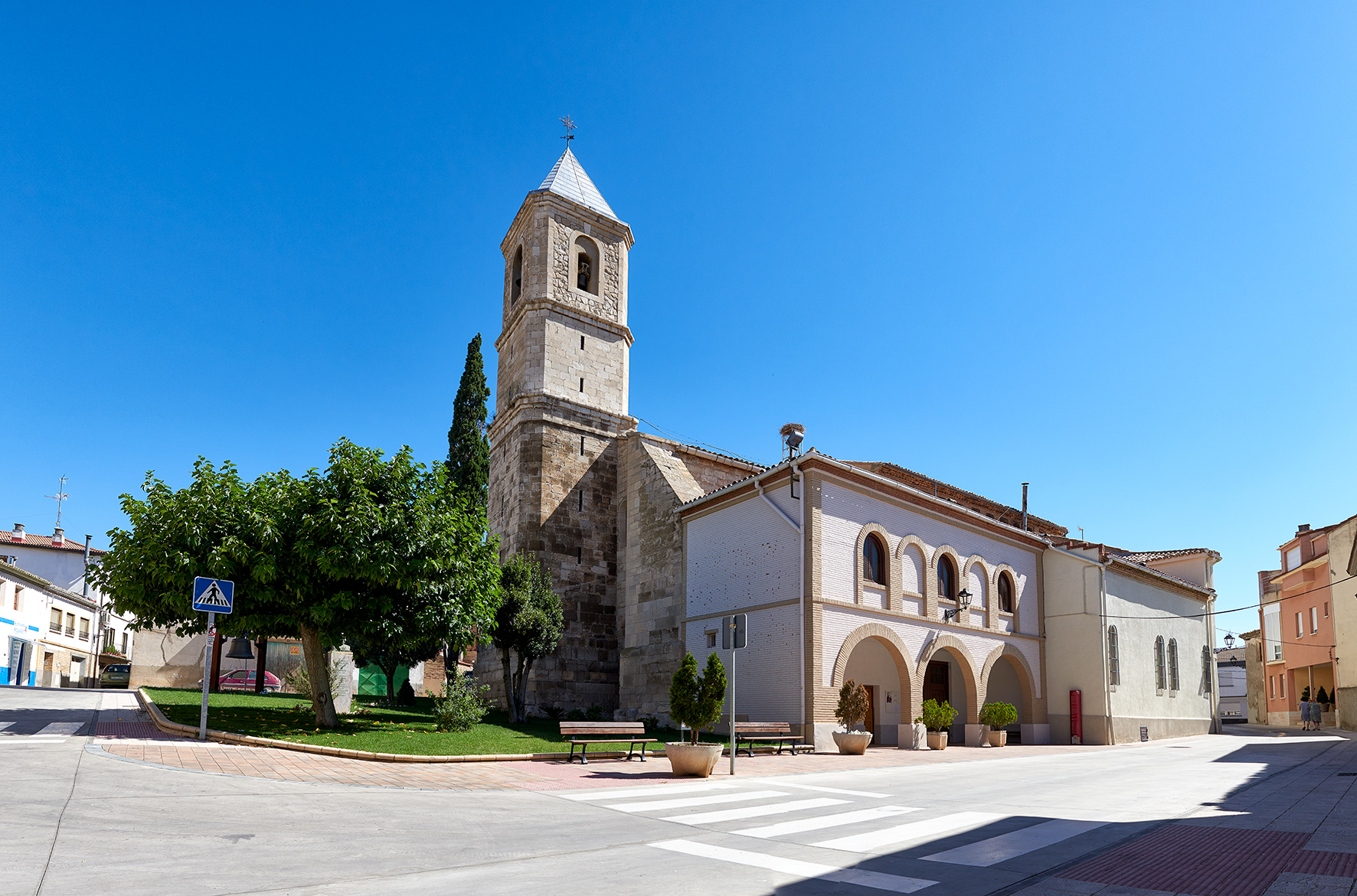 Parròquia de la Asunción de Fustiñana (Navarra)